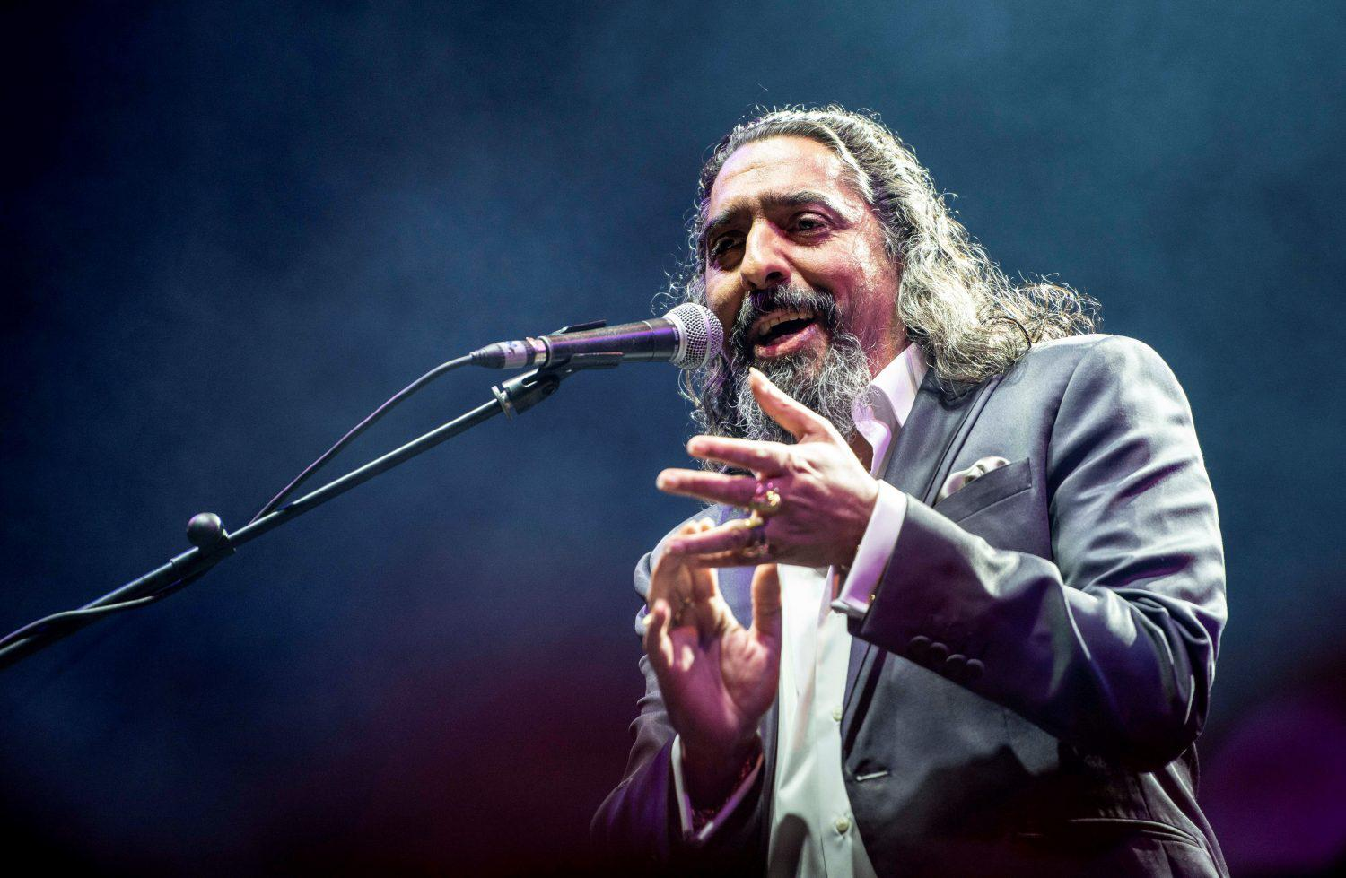 Las fiestas de San Isidro se despidieron ayer de Madrid hasta el año que viene con una jornada en la que los madrileños y madrileñas pudieron disfrutar de 43 actividades y conciertos repartidos por toda la ciudad y para todos los gustos y edades.